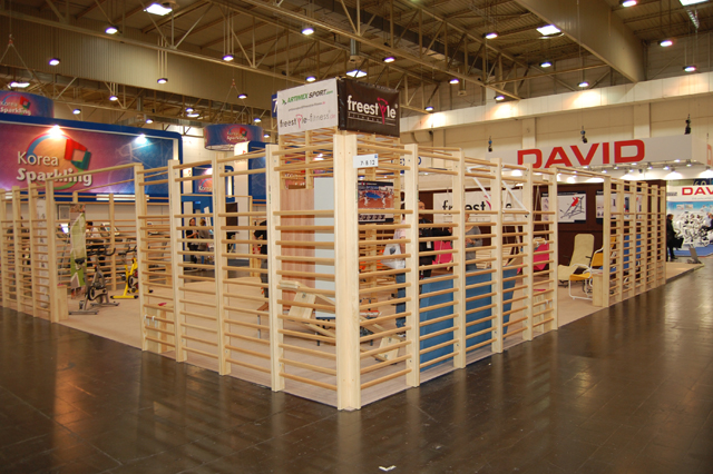 ARTIMEX SPORT Expo FIBO 2010